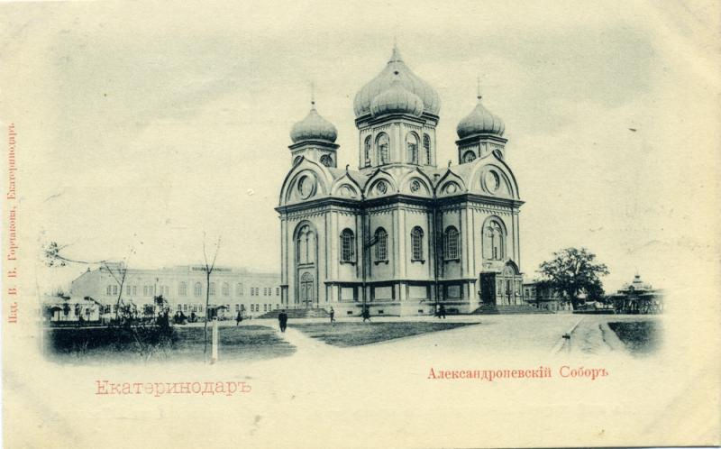 Александровский собор в Екатеринодаре. Старинная открытка